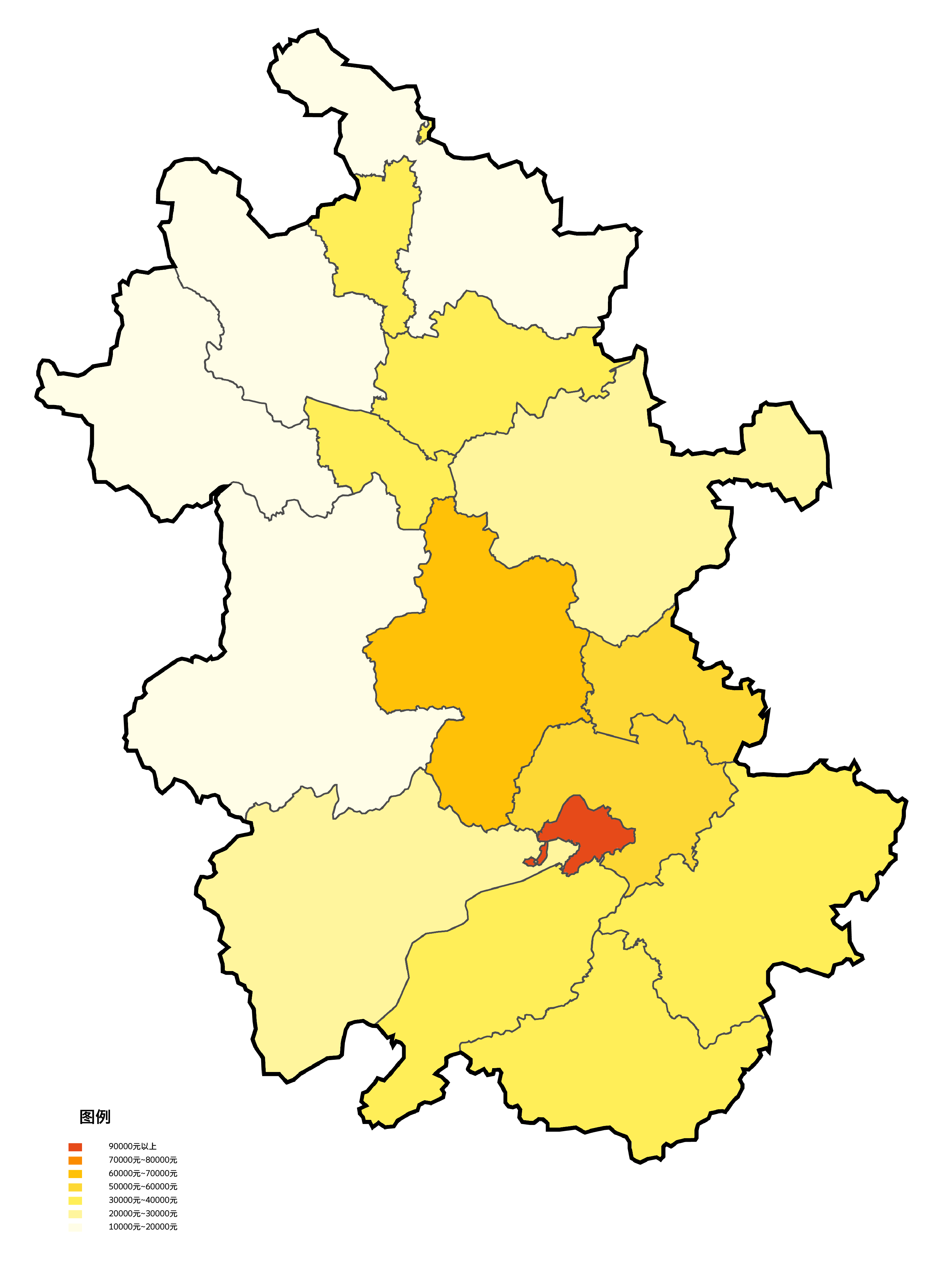 中文（中国大陆）: 安徽省各地级市根据2013年人均地区生产总值填色地图